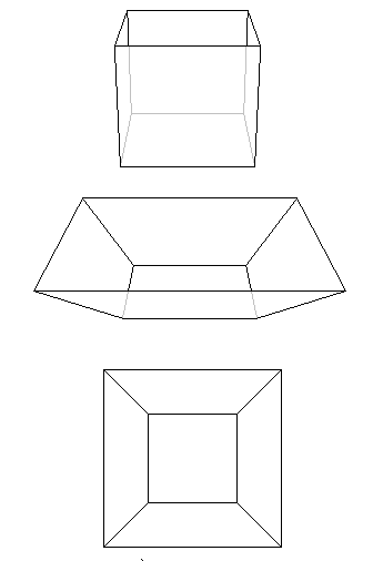 תהליך הטרנספורמציה של ה"קופסה" הפתוחה לכדי רשת של נקודות מקצועות ושטחים.